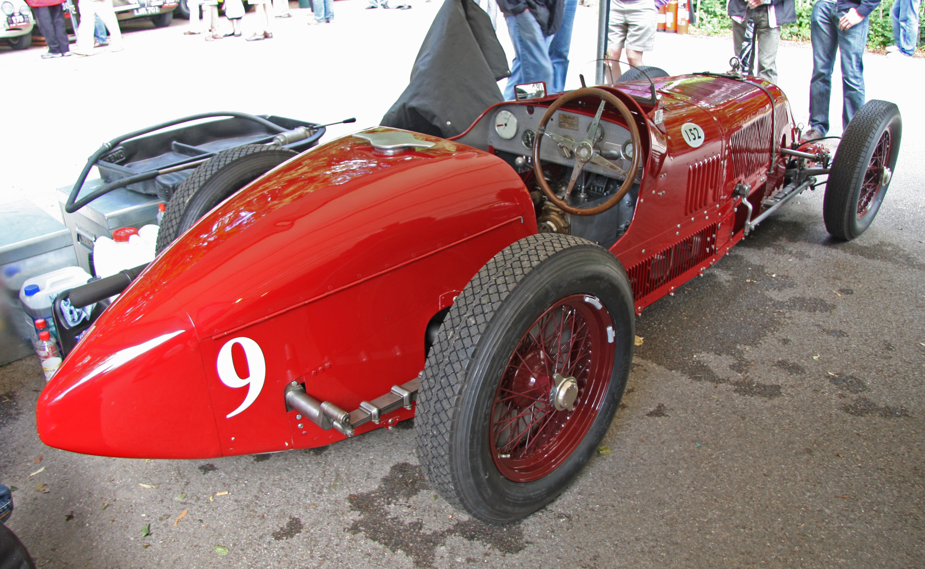 Built 1927. 1,5 litre 8 cylinder